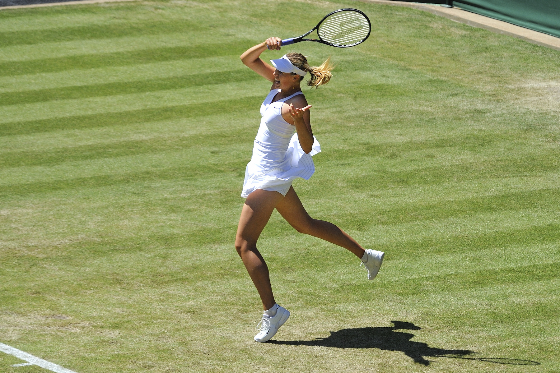 Maria Sharapova – Wimbledon 2009